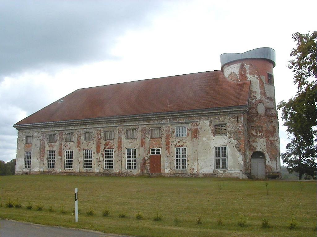 Vietalvas luterāņu baznīca 2002-06-22